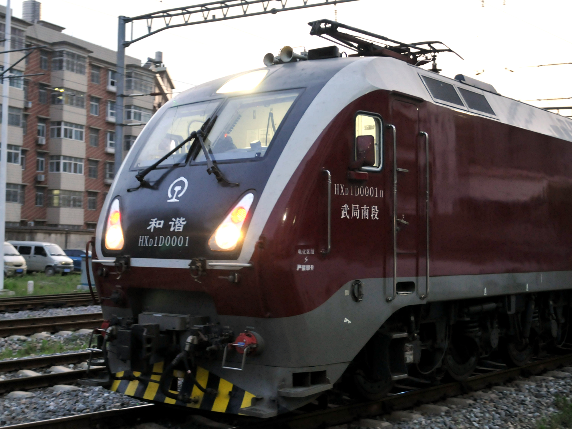 武局南段配属额试作型全黑前脸涂装的HXD1D-0001车在武昌机务折返段内